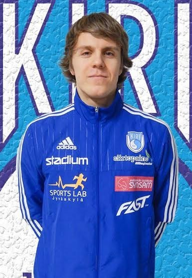 Ville Kotro